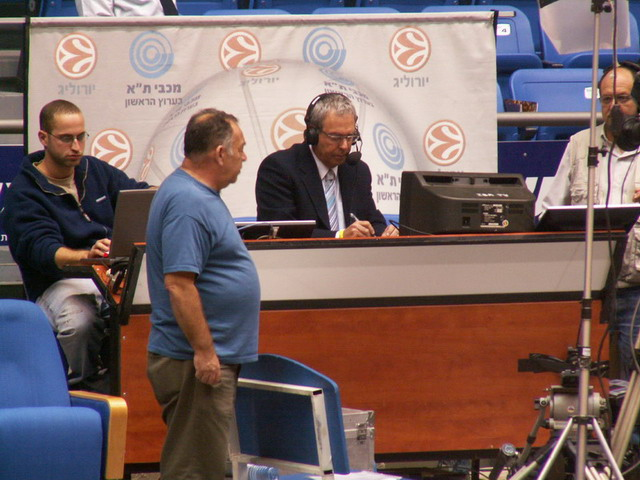 יורם ארבל בעמדת השידור